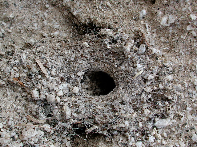 Filistatid web, Anza Borrego